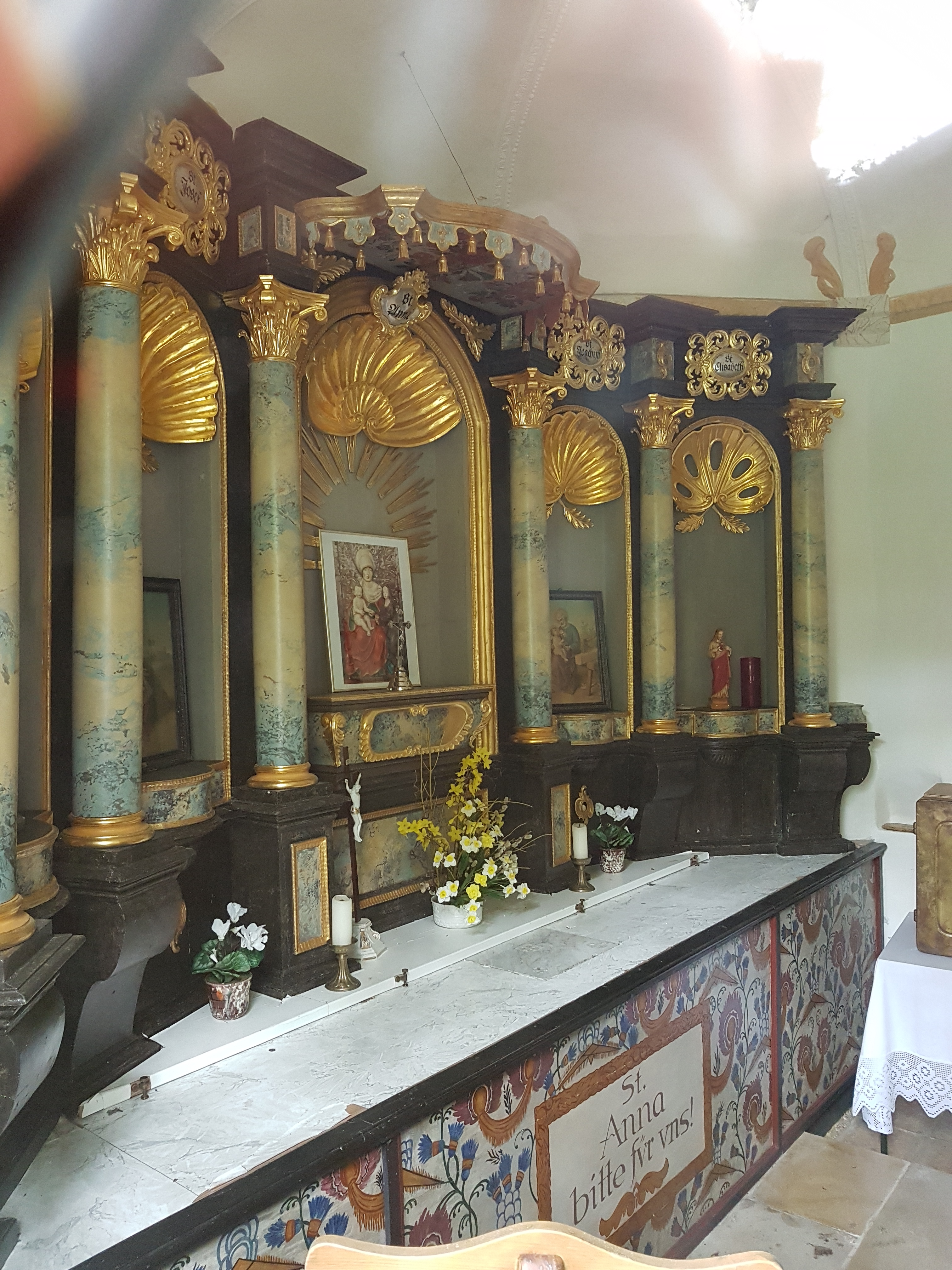 Straucharting (Sauerlach), St. Anna-Kapelle, spätbarocker fünfteiliger Altar ehemals mit Figurschmuck (Wolfratshausener Schnitzarbeit), dieser jetzt in Verwahrung.